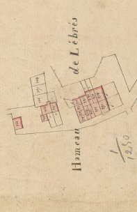 Llebrers, de Caladroer, en el Cadastre napoleònic del 1812 (Arxius Departamentals dels Pirineus Orientals)